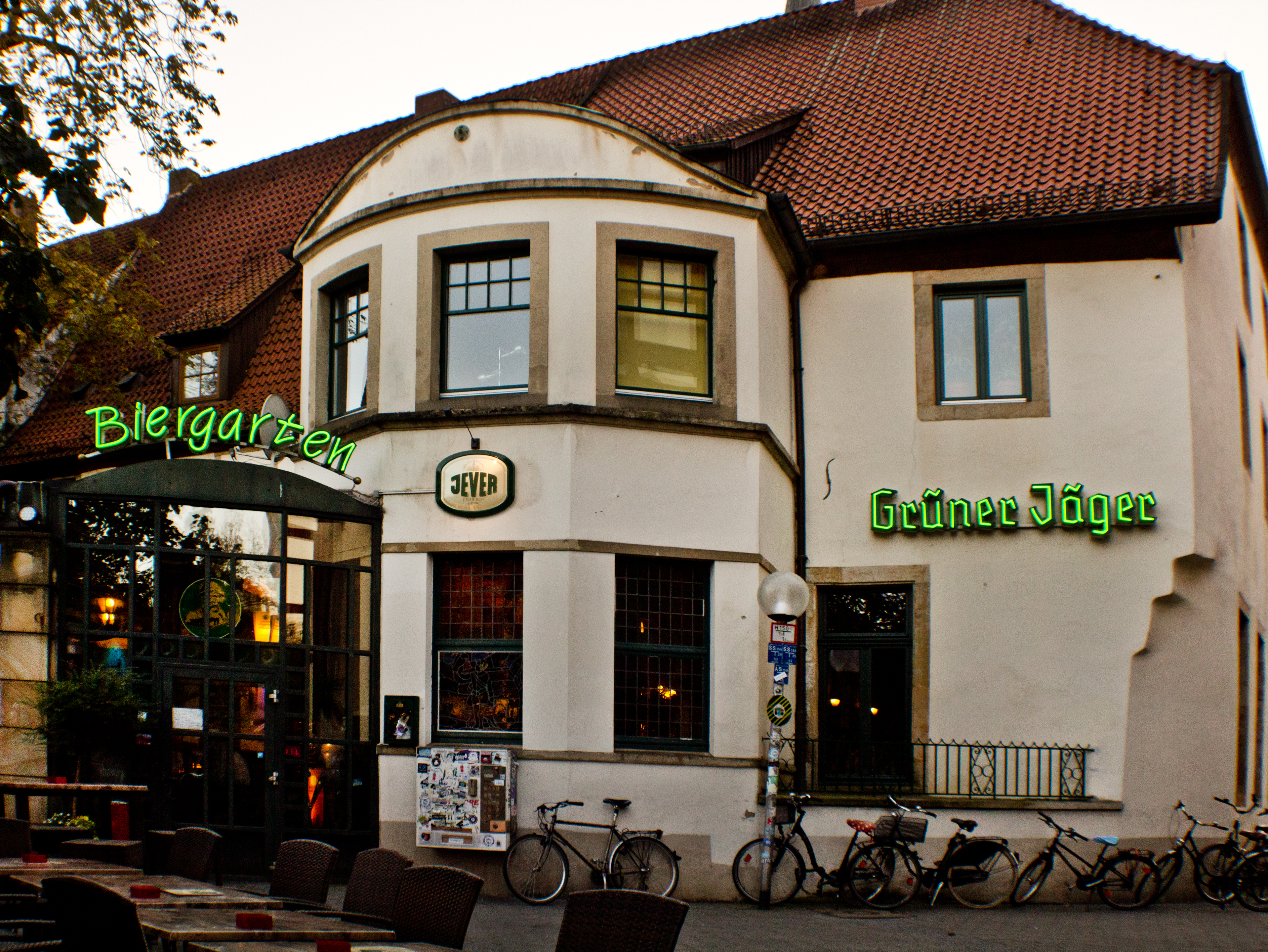 Zu sehen ist der Hintereingang